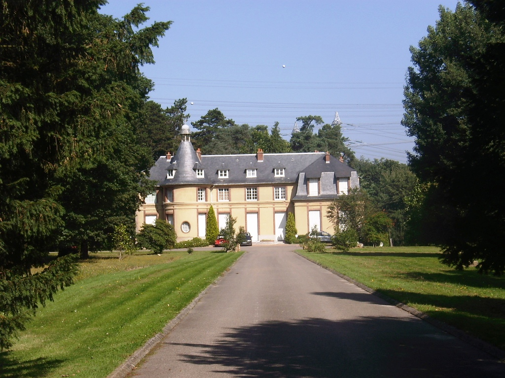 Château du Bois-Courtin de Villejust (91)